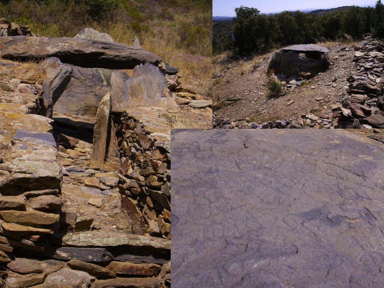 Esquerra vista sud; dreta vista nord; llosa coberta amb gravats